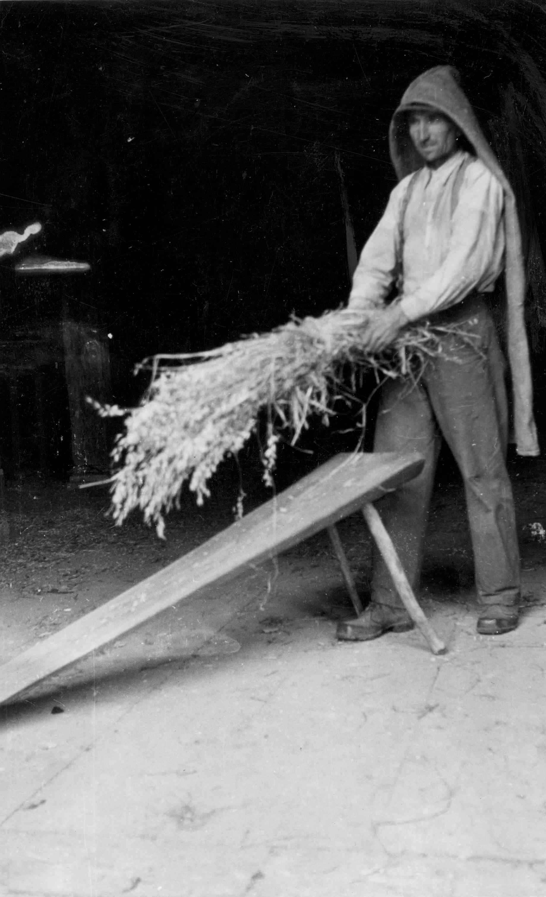 "Muatn stou" na katerem se "šapa" oves v Pazrijah.